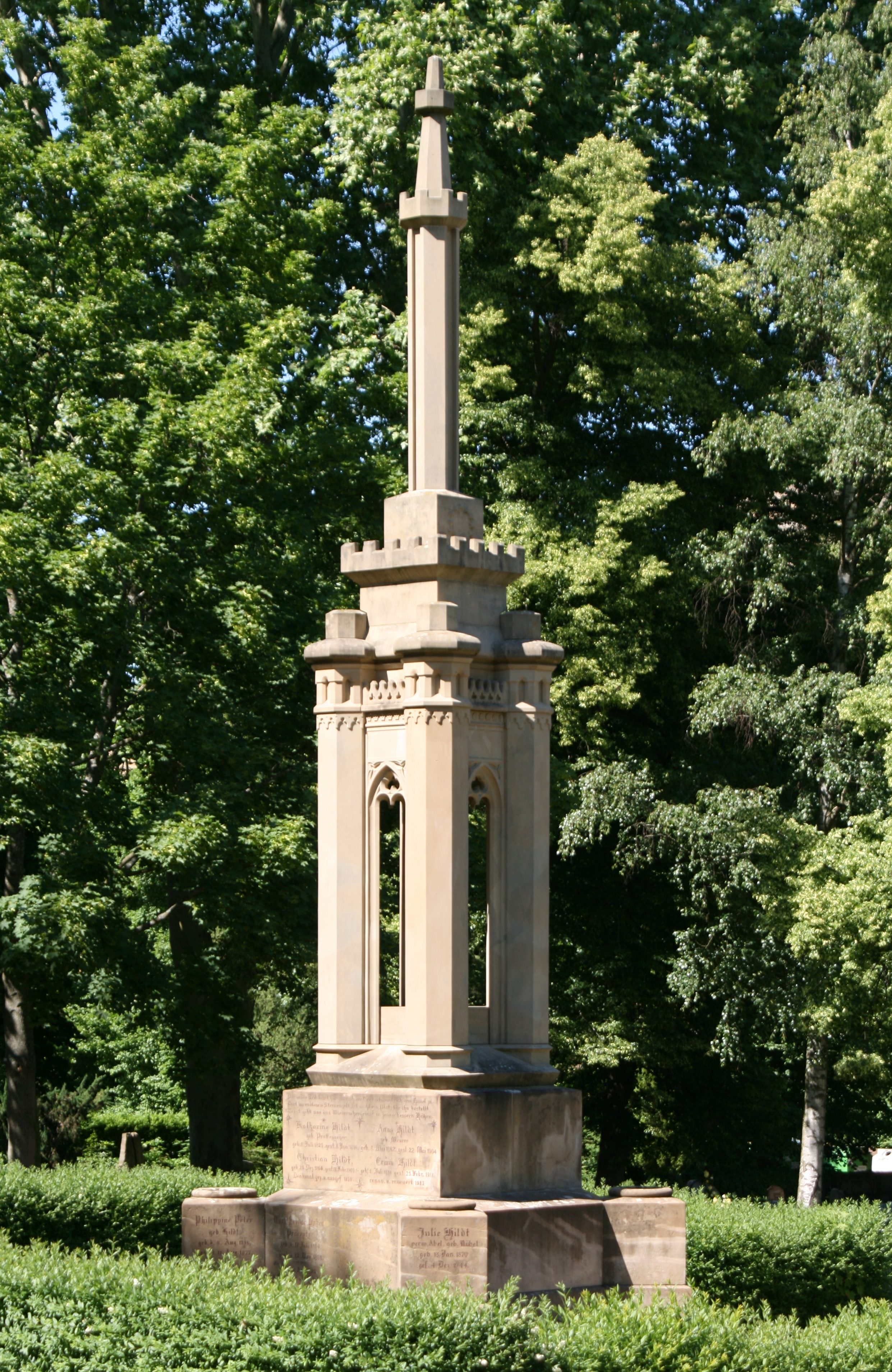 Das Hildtsche Grabmal auf dem Weinsberger Friedhof